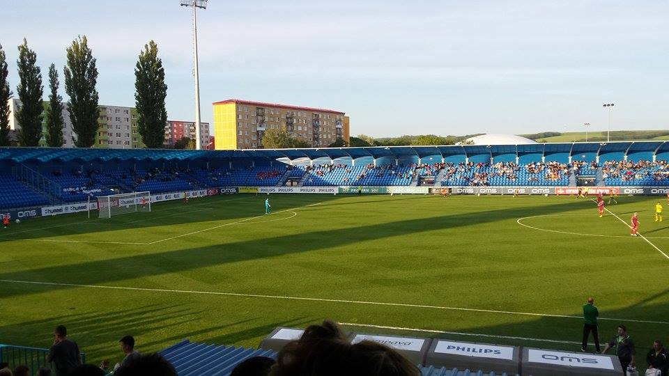 FK Senica štadión